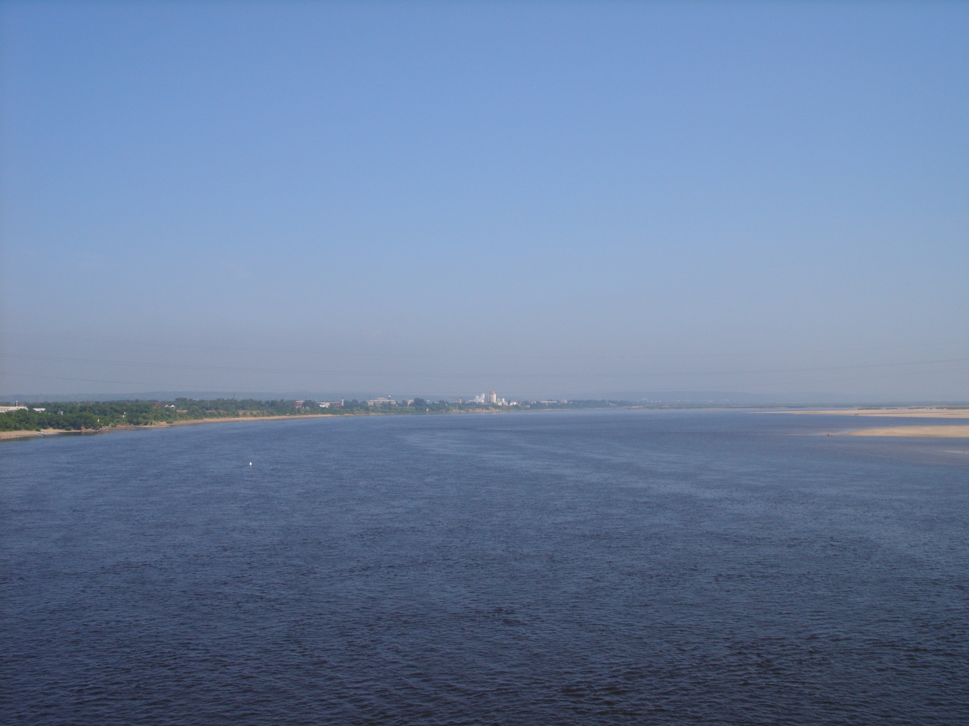 Благовещенск. Вид с автомобильного моста через Зею. Вид на север (вверх по реке). Снимок августа 2011 г.